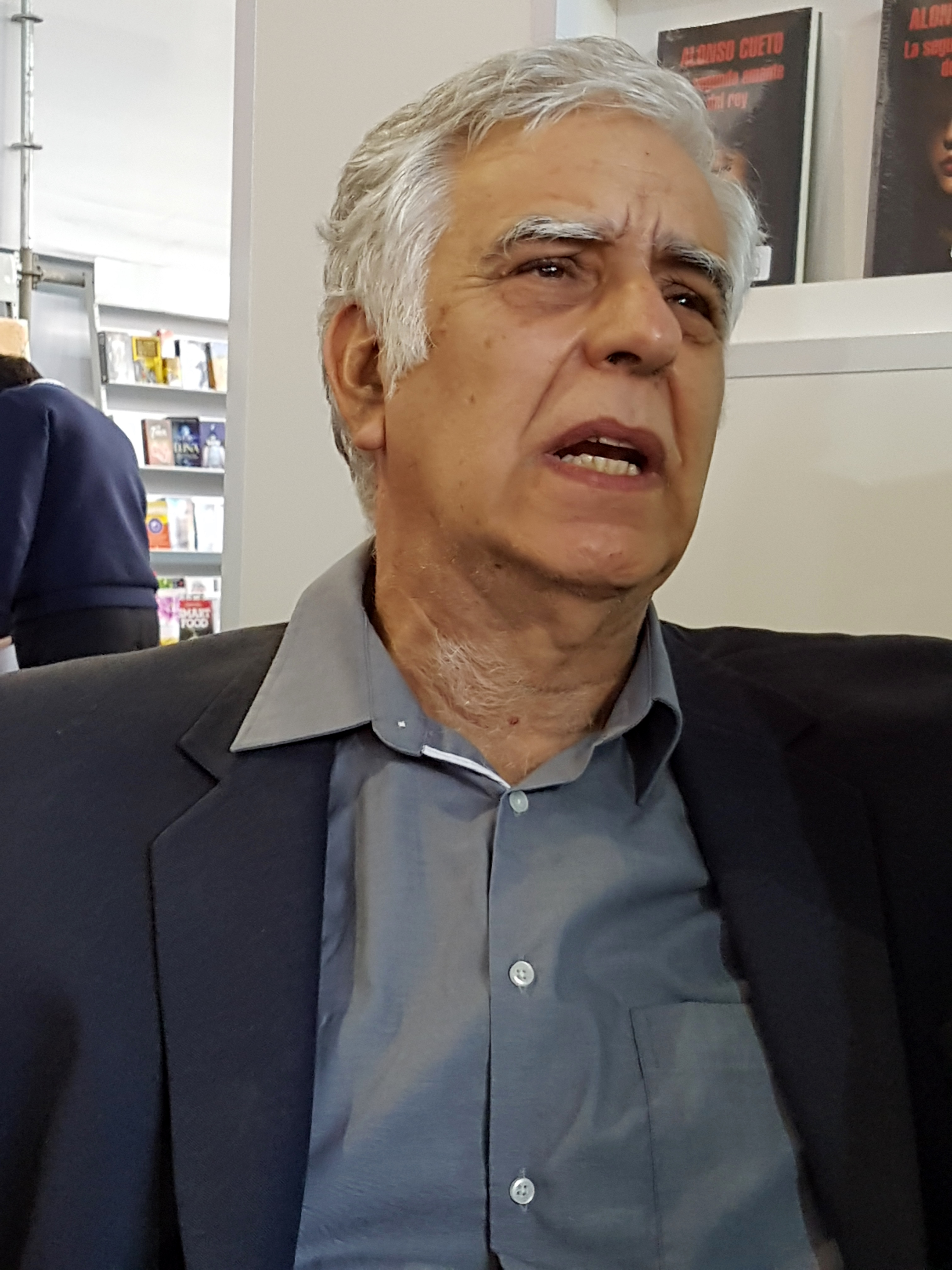 El escritor peruano Alonso Cueto en la Feria Internacional del Libro de Santiago 2017.